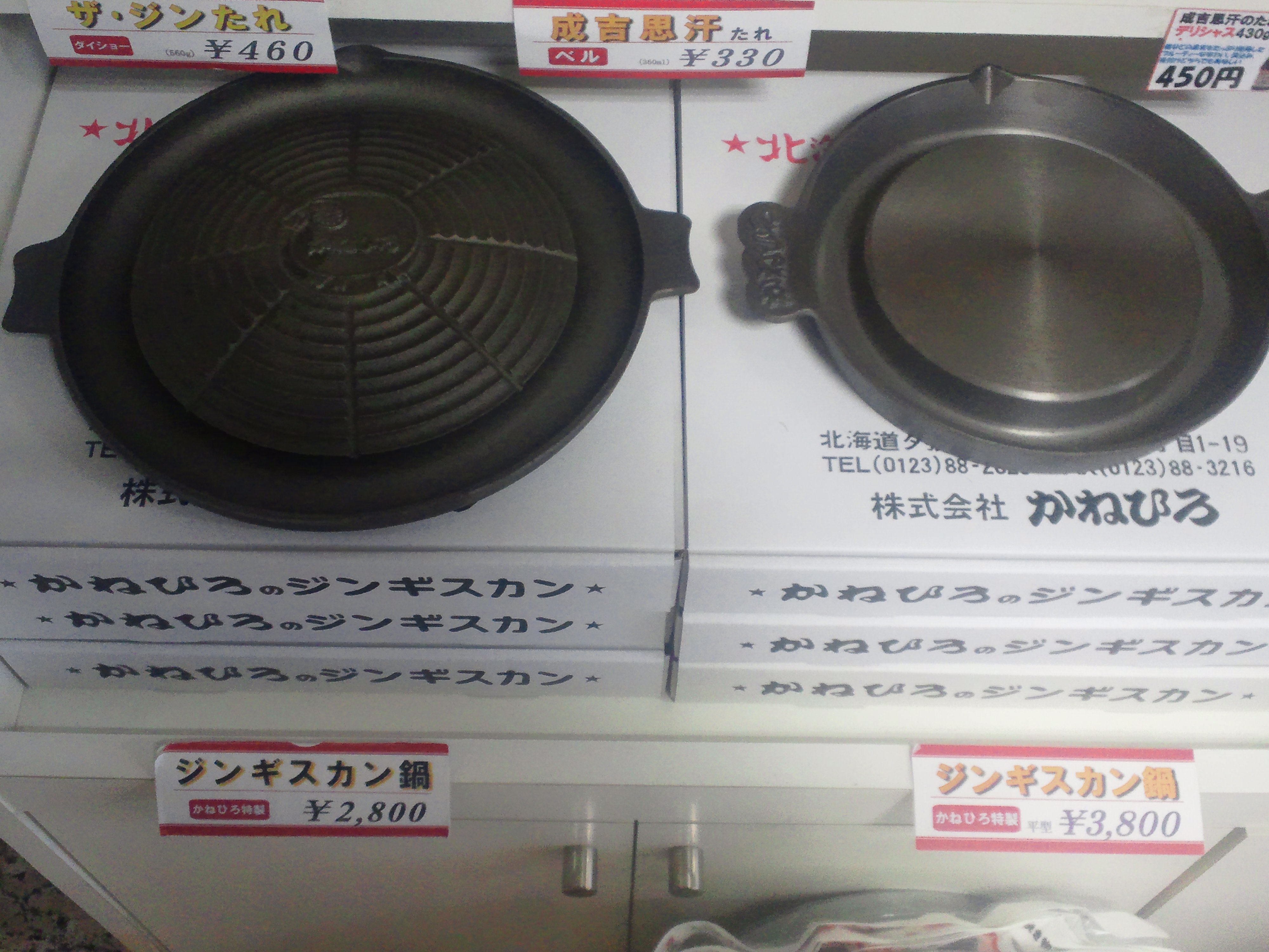 かねひろのジンギスカン鍋（左：生肉用の鍋 右：味付け用の鍋）